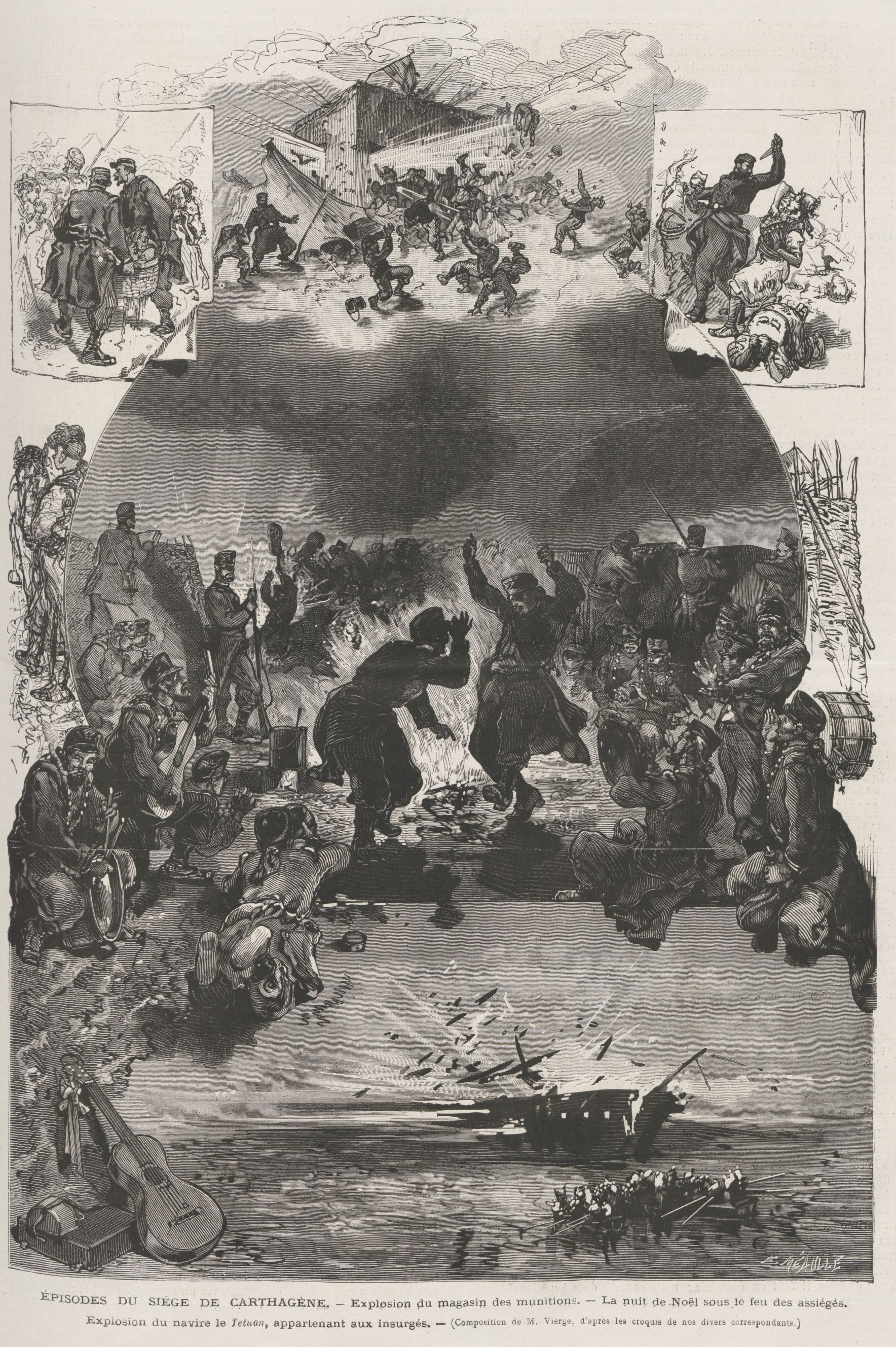 Episodes du siege de Carthagéne. — Explosion du magasin des munitions. — La nuit de Noël sous le feu des assiégès. — Explosion de navire le Tetuan, appartenant aux insurgés. — (Composition de M. Vierge, d'après les croquis de nos divers correspondants)